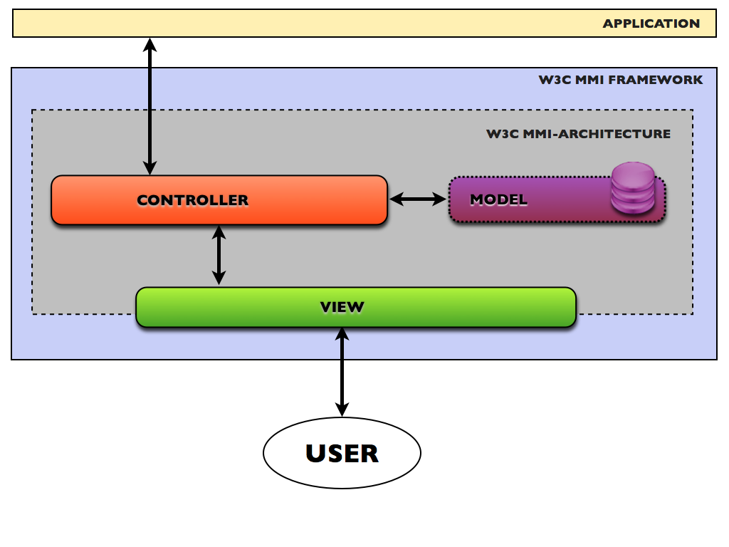 MVC Model